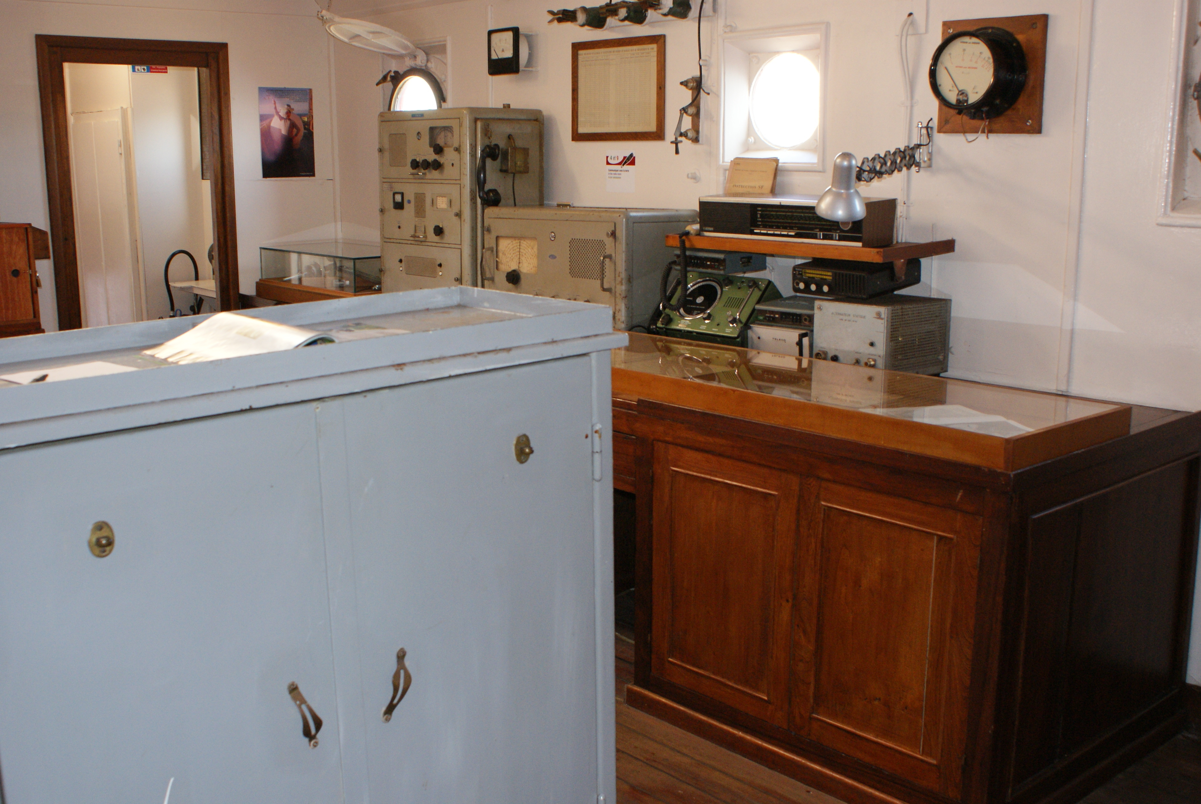 Bateau feu Sandettié (Dunkerque) salle de travail